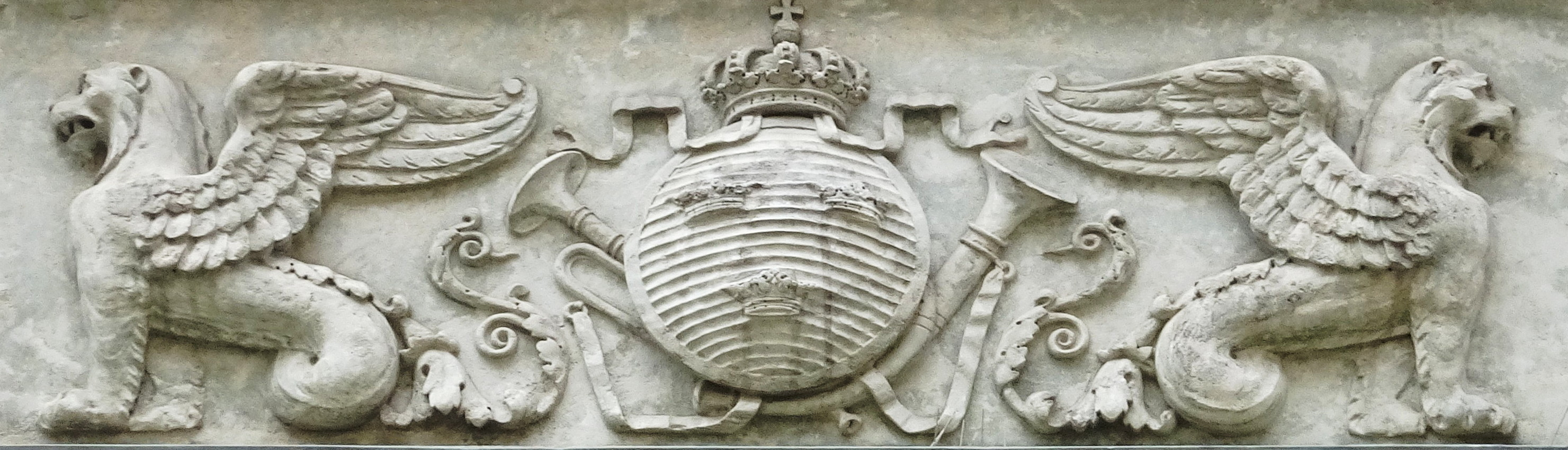 Kongl Post Huset, utsmyckning över ingången